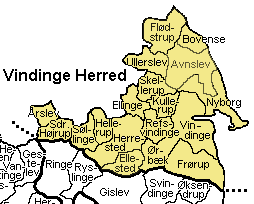 Vindinge Herred Svendborg Amt, Denmark. Map by Svend-Erik Christiansen, edited by user:Nico-dk .